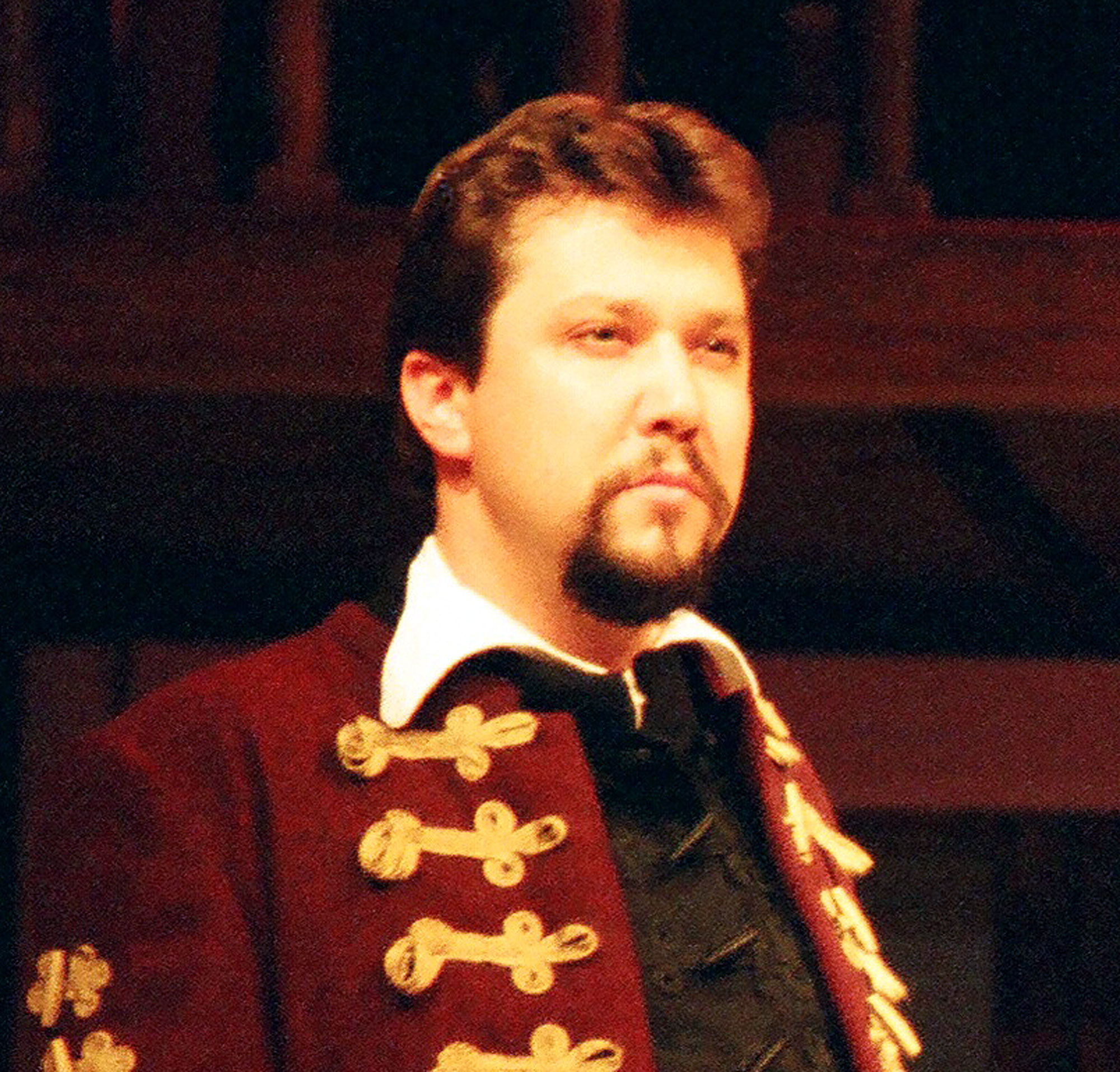 Urbán-nagy Róbert magyar operaénekes Kálmán diák szerepében Poldini Ede Farsangi lakodalom c. operájában. A fotó a debreceni Csokonai Színházban készült.